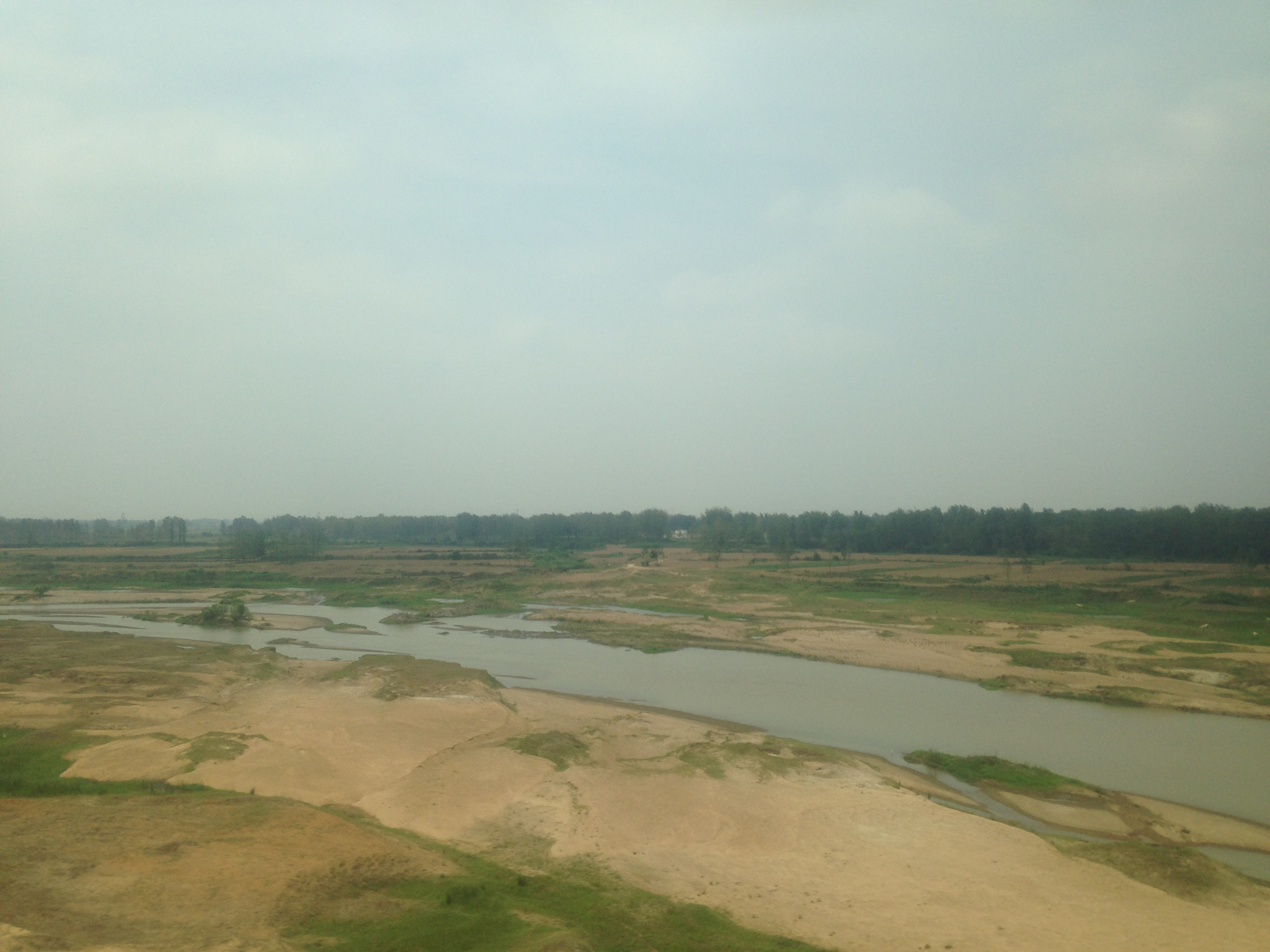 石武旅客専用線の列車内より望む淮河